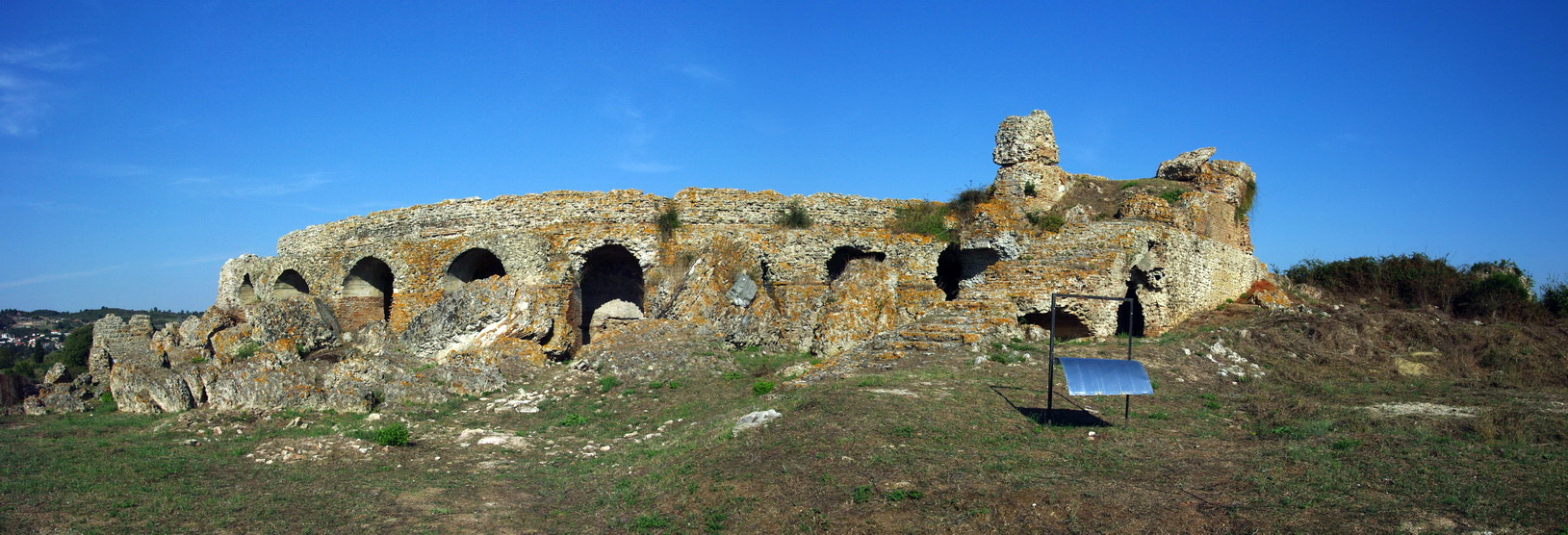 Nikopolis, Aussenansicht Odeon